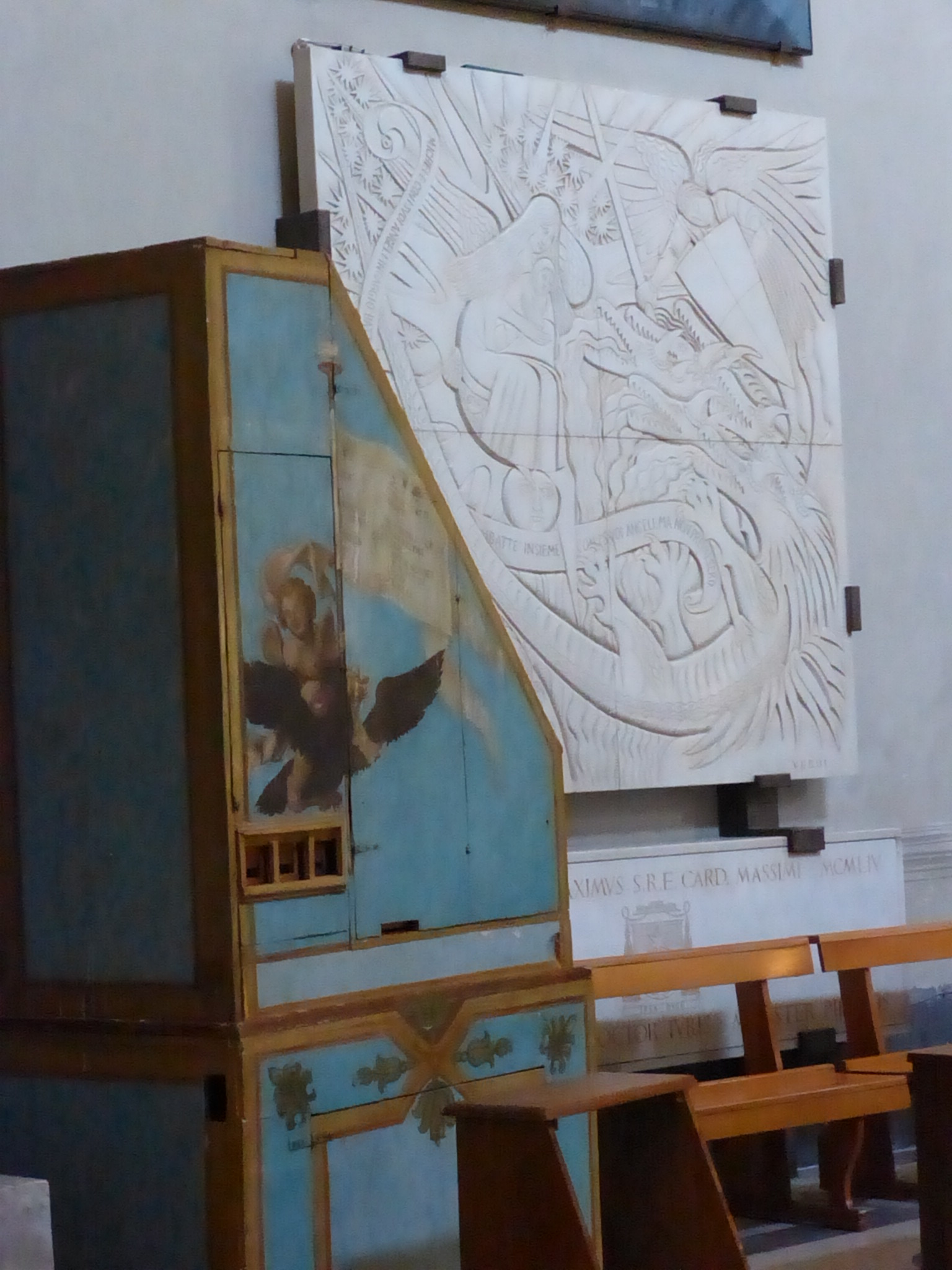 Roma, S. Maria in Portico, pulpito e sepolcro del card. Massimi.